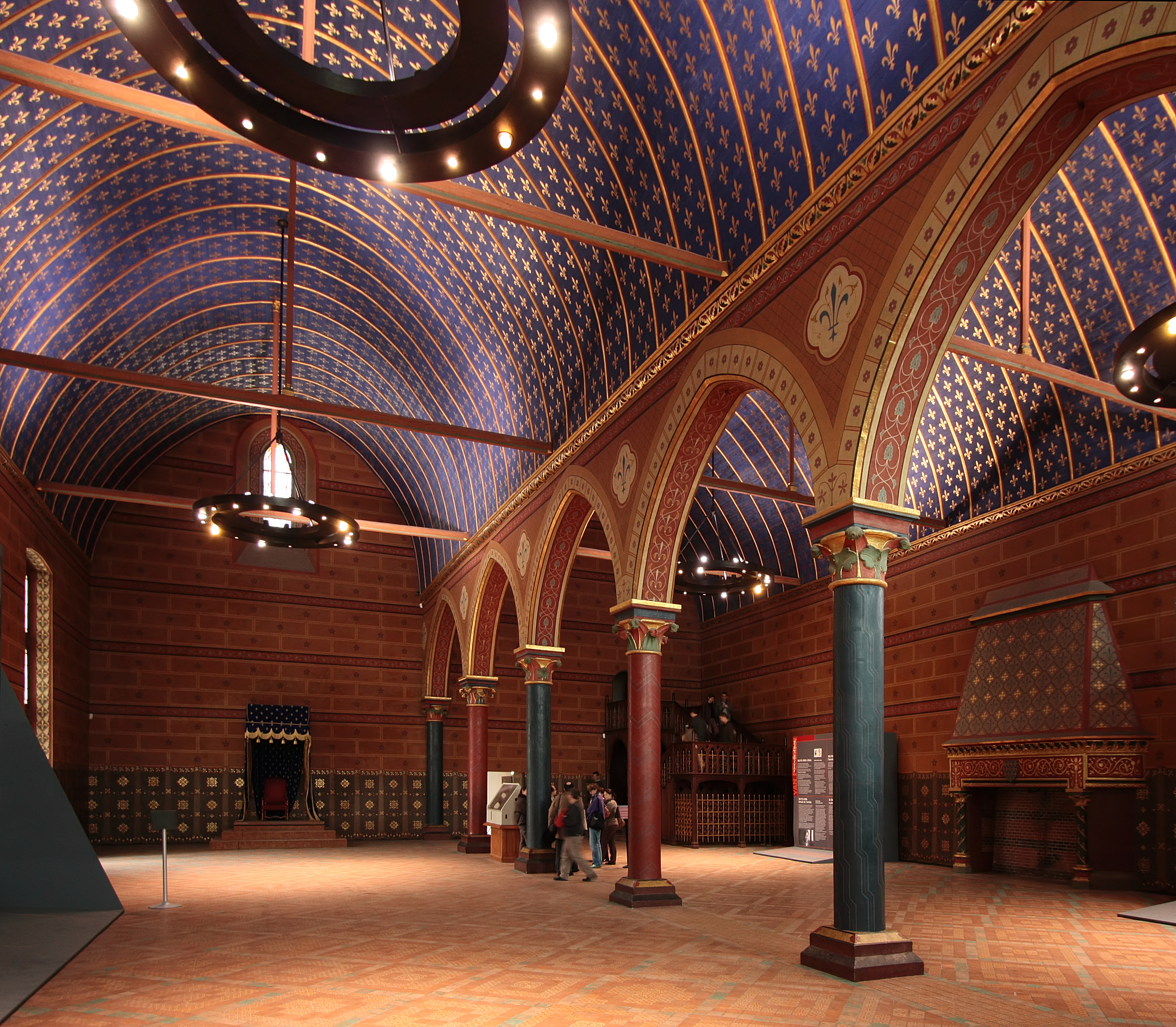 Der Ständesaal im französischen Schloss Blois